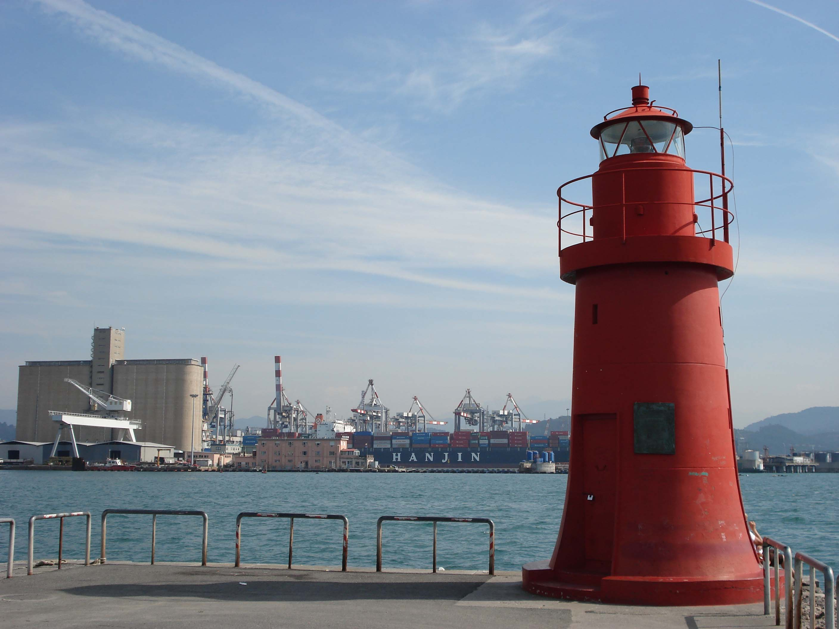 Il porto mercantile - La Spezia - Italia.